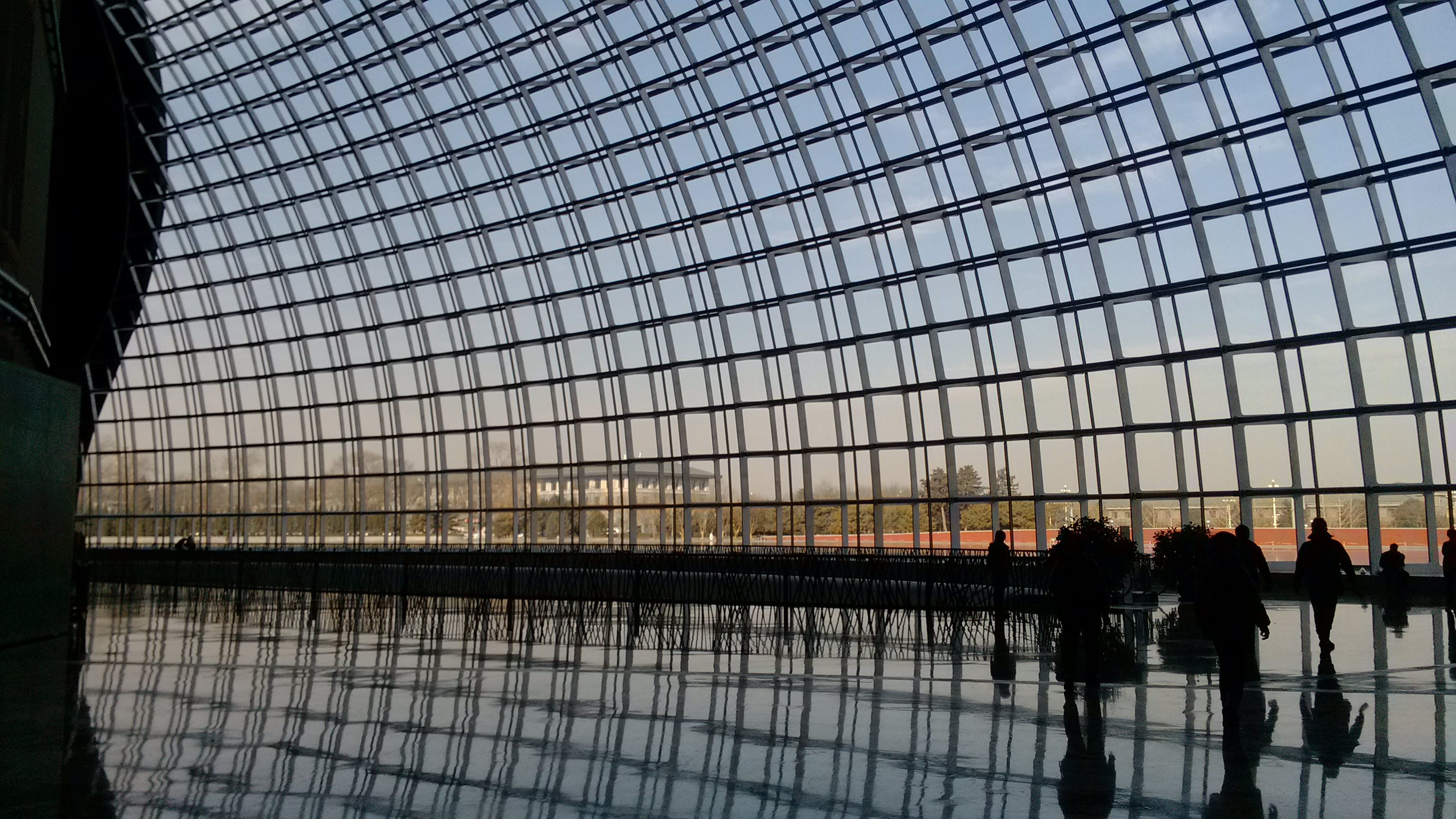 2014-1-北京-国家大剧院